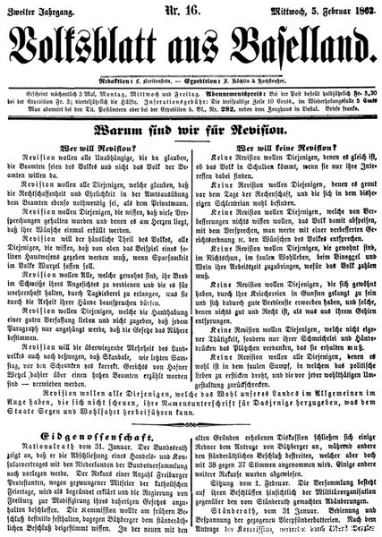 Volksblatt aus Baselland, Ausgabe vom 5. Februar 1862, Schweiz